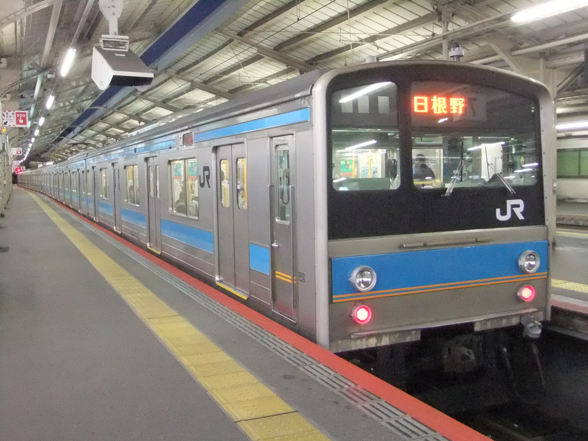 阪和線の205系では前面と乗務員室扉にオレンジのラインを追加した車両が登場した。